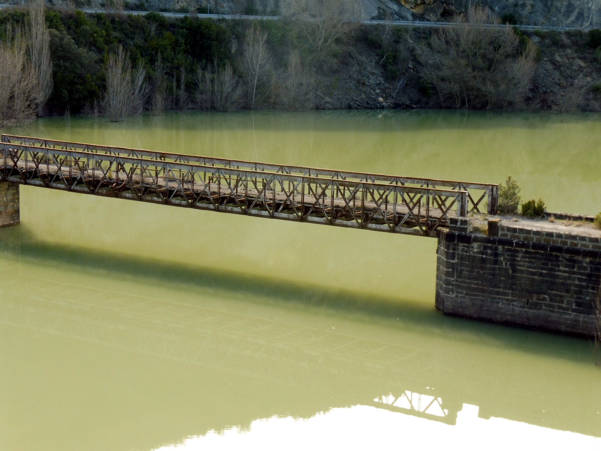 Pantà de Camarasa, sector Palanca (Noguera): la palanca que dóna nom al sector This is a a photo of a wetland in Catalonia, Spain, with id: IZHC-16002301